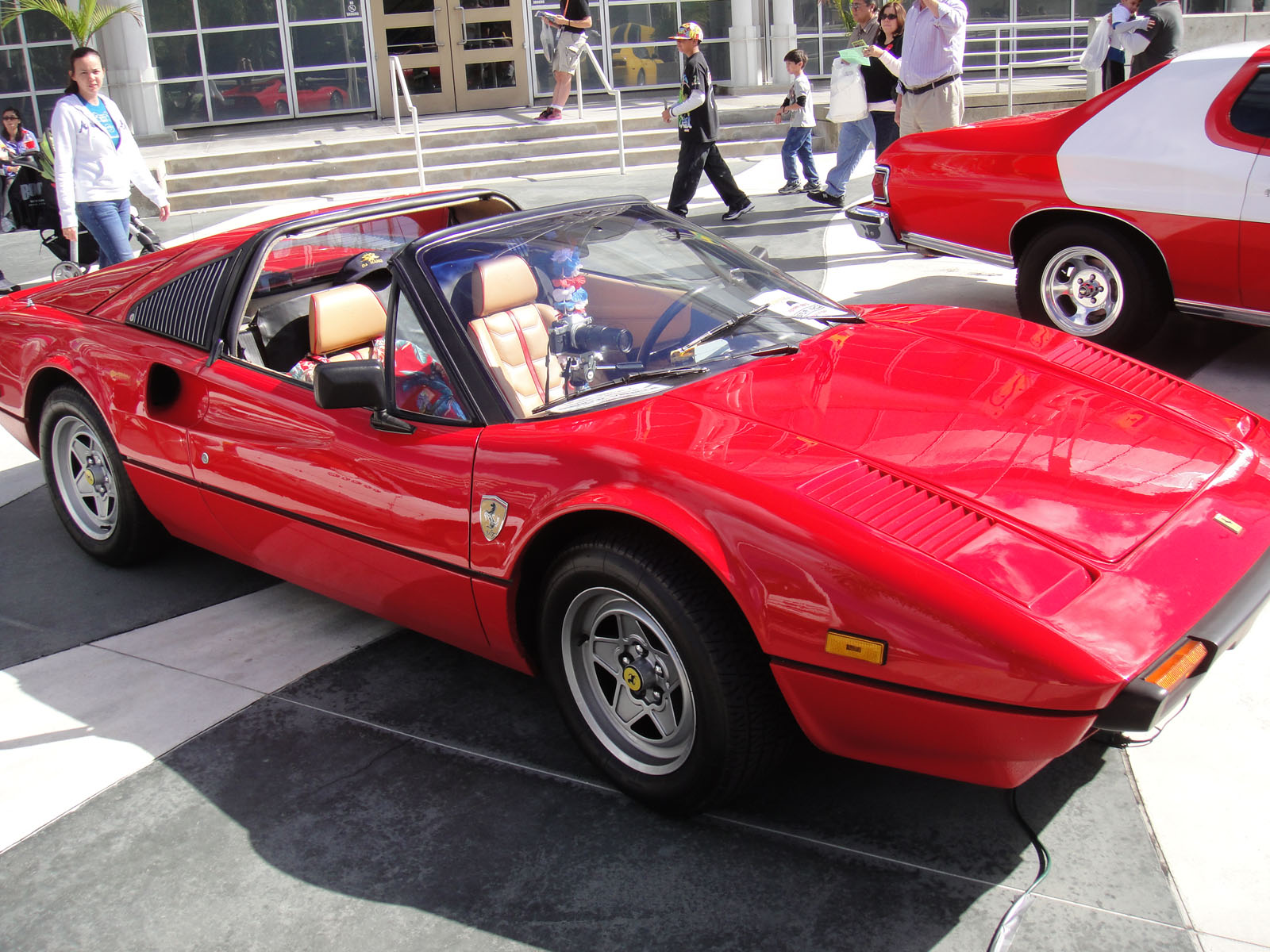 Ferrari 308 GTSi from Magnum P.I.